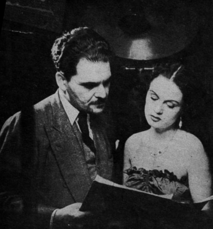 Director y estrella: Coke y Beverle Bush, estudiando el libreto, antes de iniciar el rodaje de las primeras escenas de "La Chica del Crillon", el film que veremos esta noche en los teators Cervantes, Central, Continental y Santa Lucia.